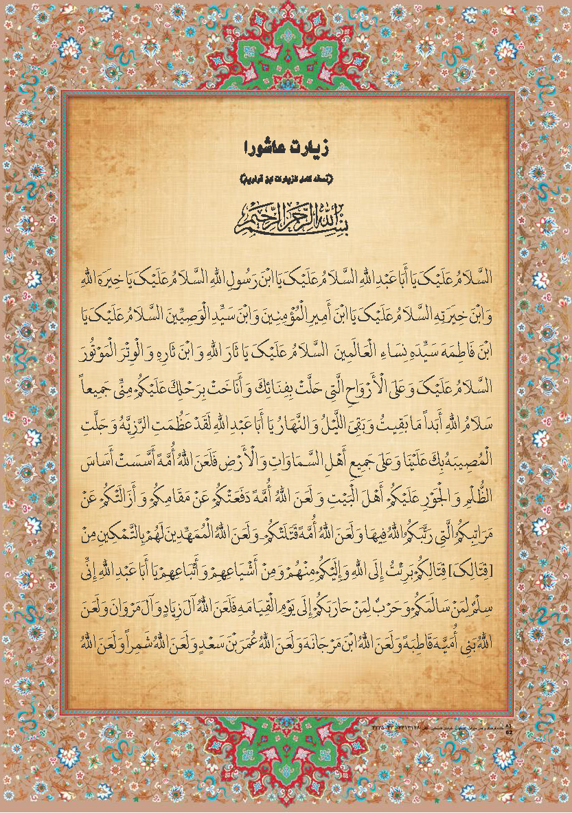 متن اصلی زیارت عاشورا از کتاب جامع الزیارات ابن قولویه